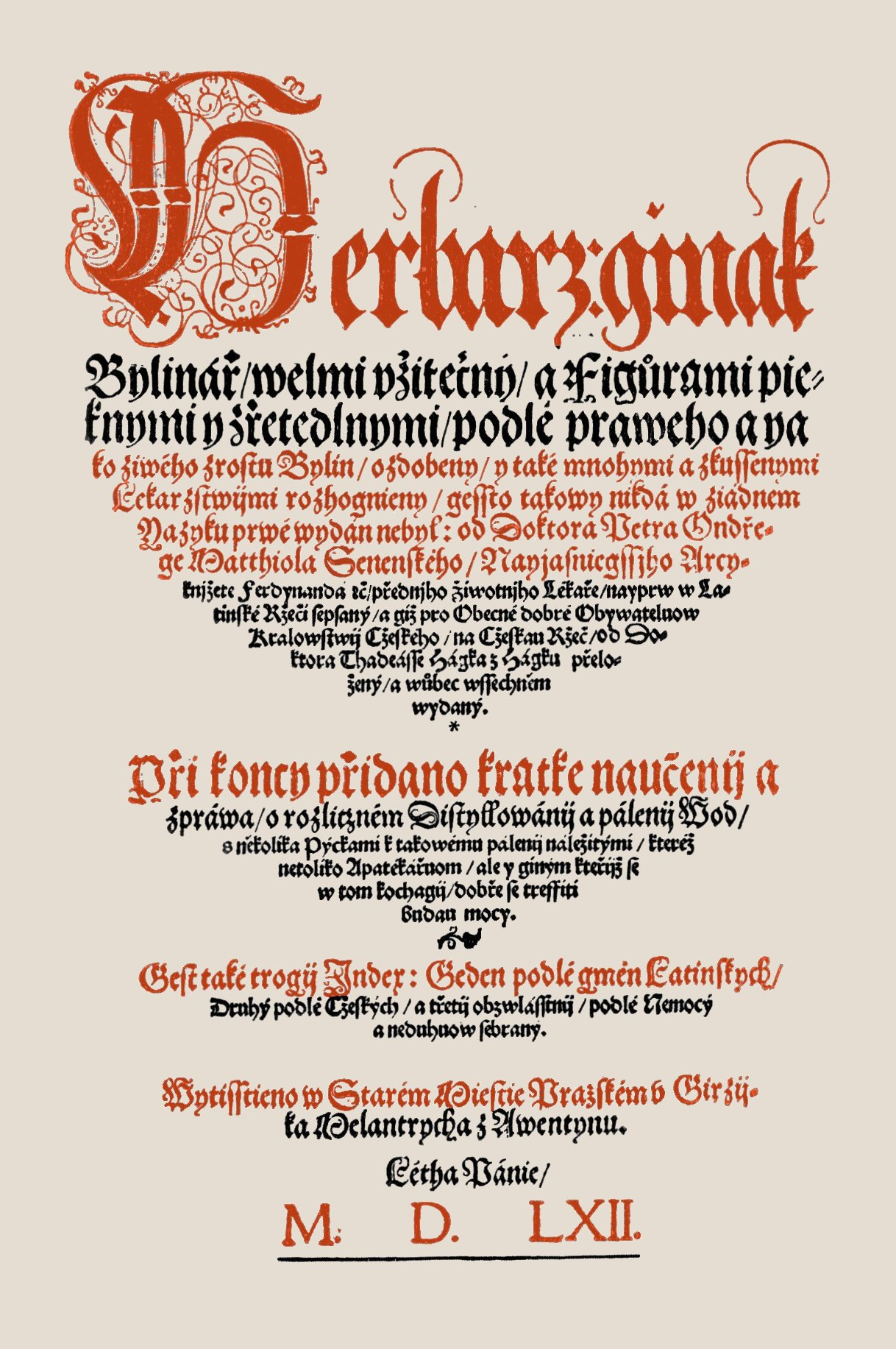 Titulní list Matthioliho Herbář neboli bylinář - barevná verze